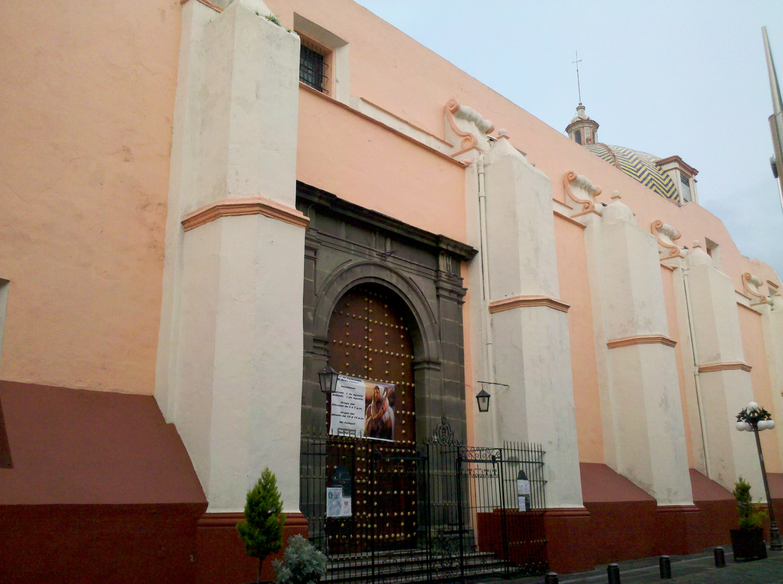 Templo Conventual de Santa Clara, Puebla, México. Siglo XVIII. 6 oriente 201.